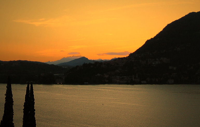 Lago di Como, 2004